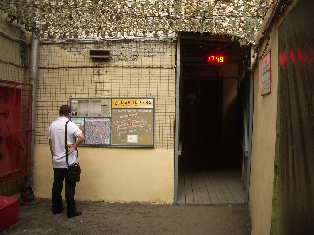 Таганский ЗКП, оголовок, вход в наружное здание